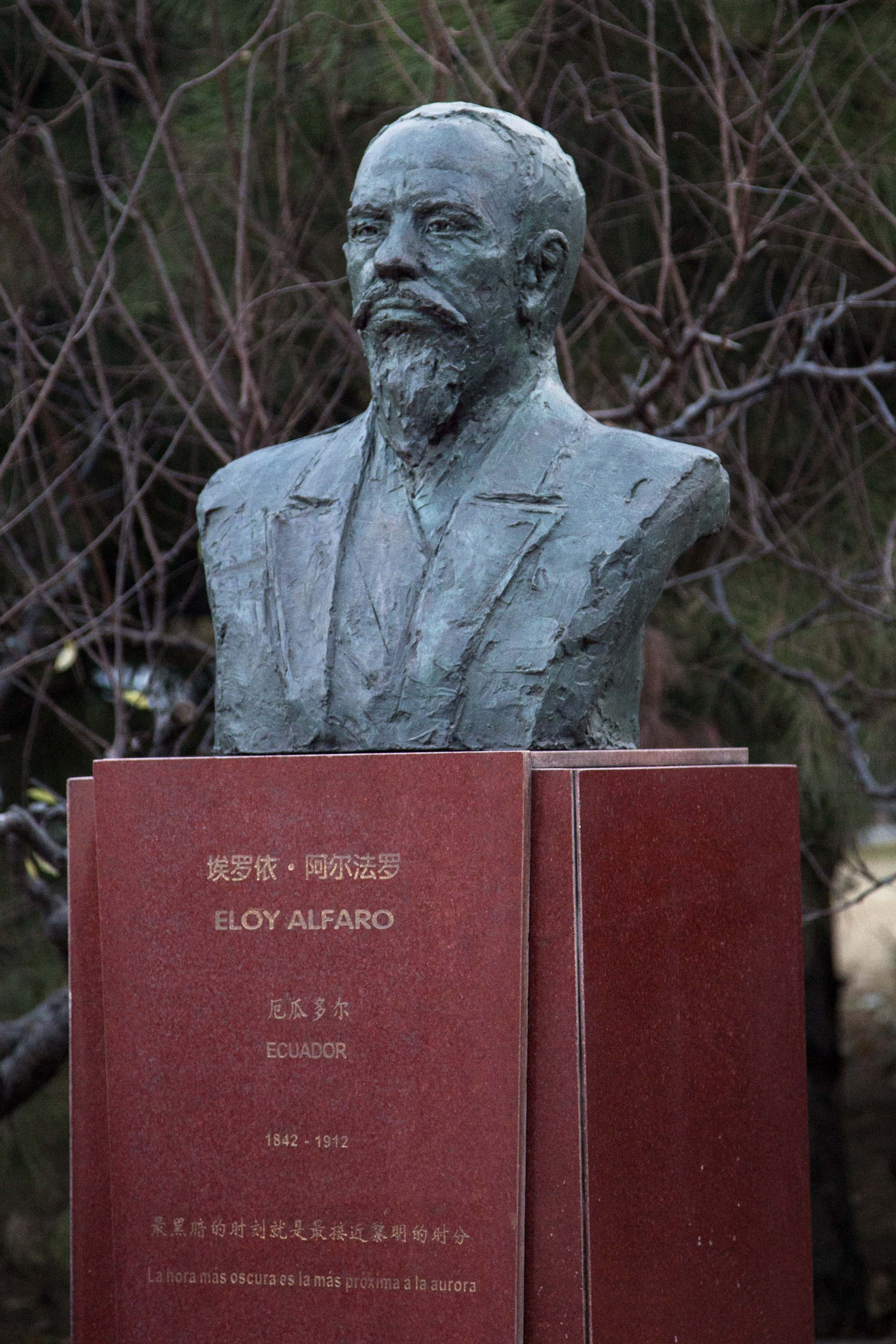 Beijing (China), 18 de noviembre 2013. En exteriores del Museo JINTAI, ubicado en el parque de Chaoyang, se realizó la colocación de la Ofrenda Floral al Busto de Eloy Alfaro por parte del artista chino Yuan Xikun, creador de dicho busto y fundador del Museo Jintai. Foto: Fernanda LeMarie - Cancillería del Ecuador.